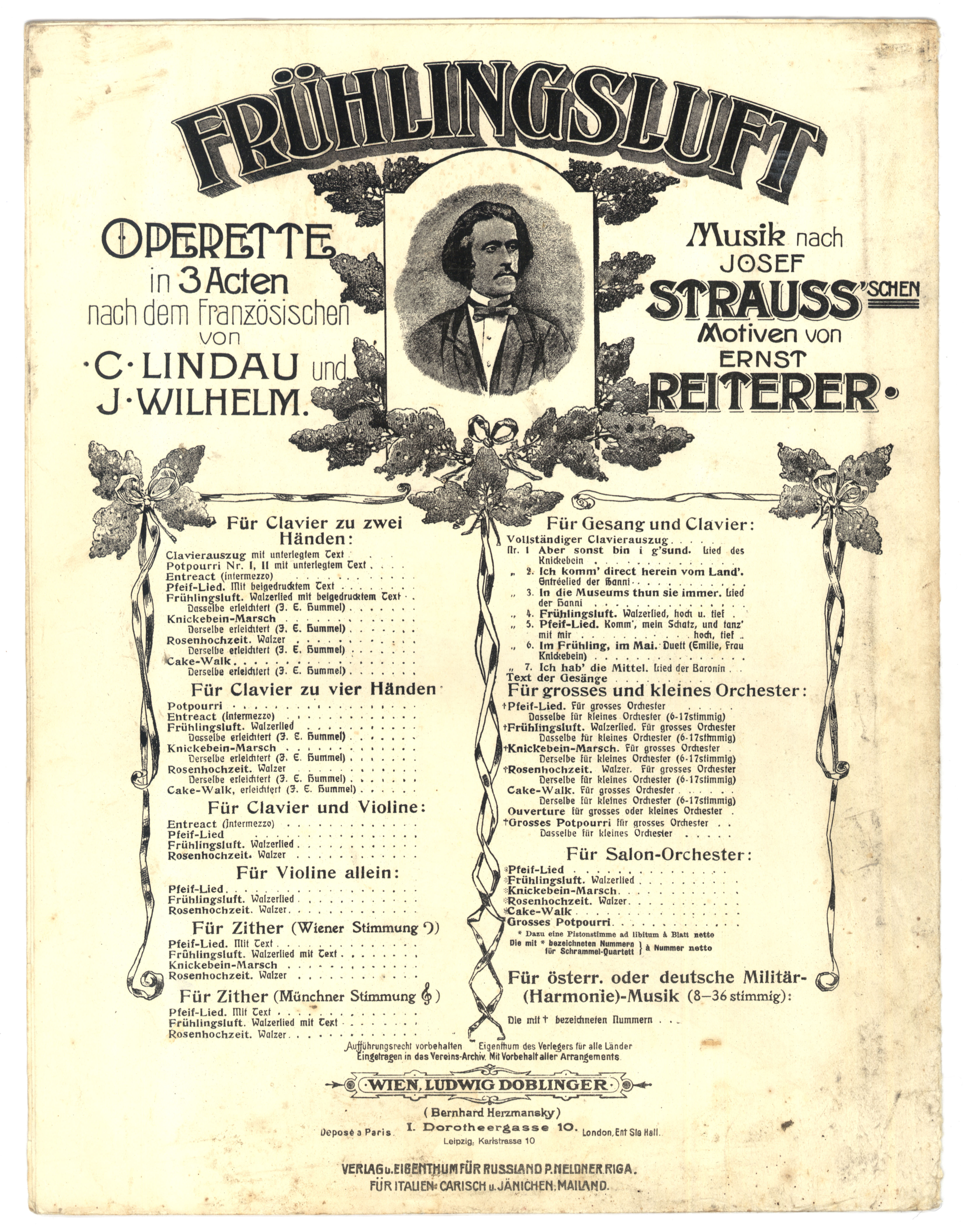 Ernst Reiterer (1851-1923), Frühlingsluft, sheet of music